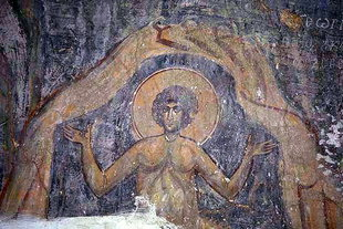 Καλαμάς: Ο Άγιος Γεώργιος στον λάκκο με τον ασβέστη